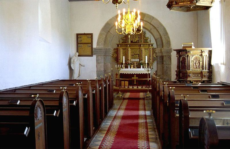 Sønderbæk Kirke, Randers Kommune, kirkerummet